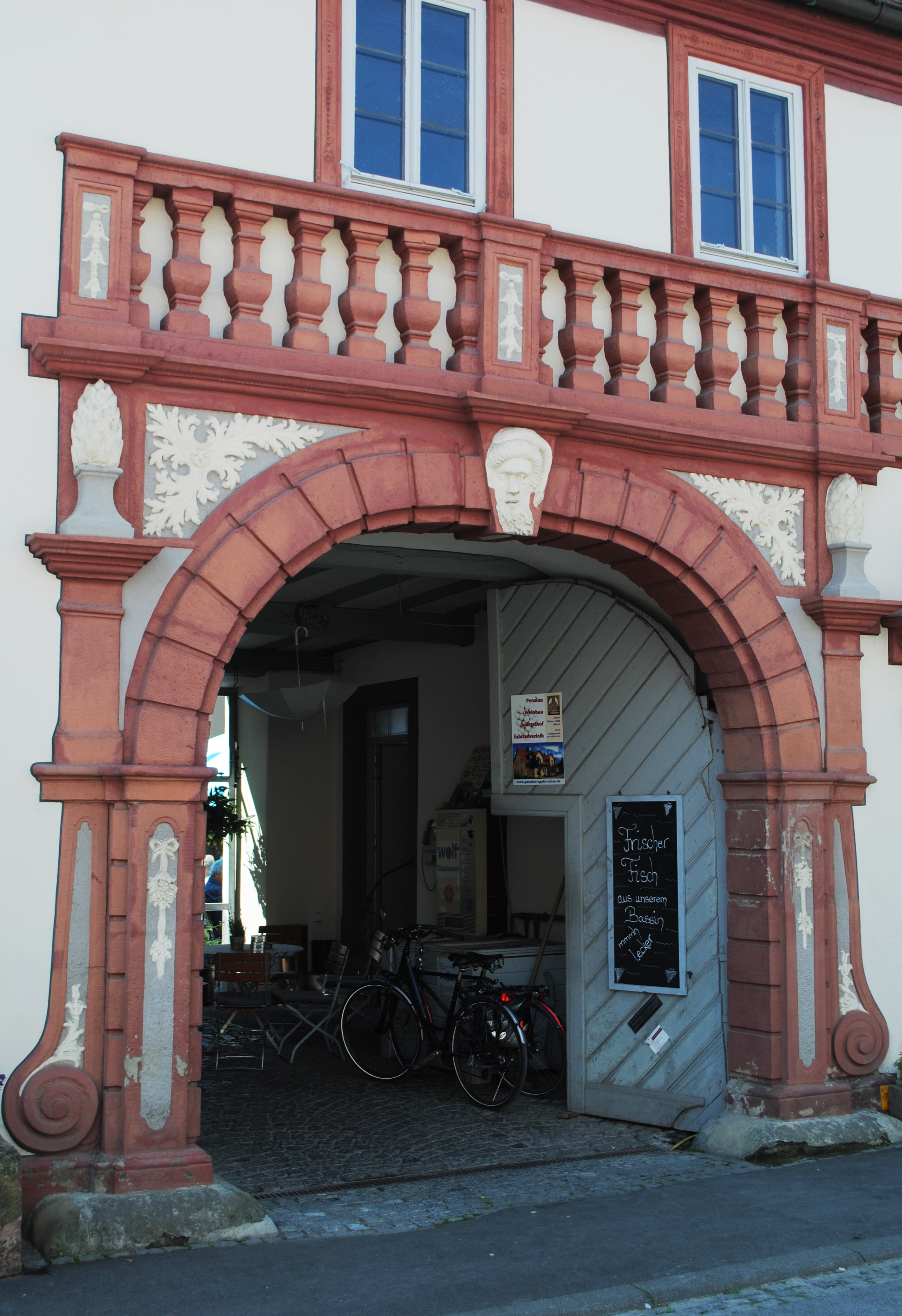 Portal, Gasthaus zum Schwan, Hauptstraße, SommerachThis is a photograph of an architectural monument.